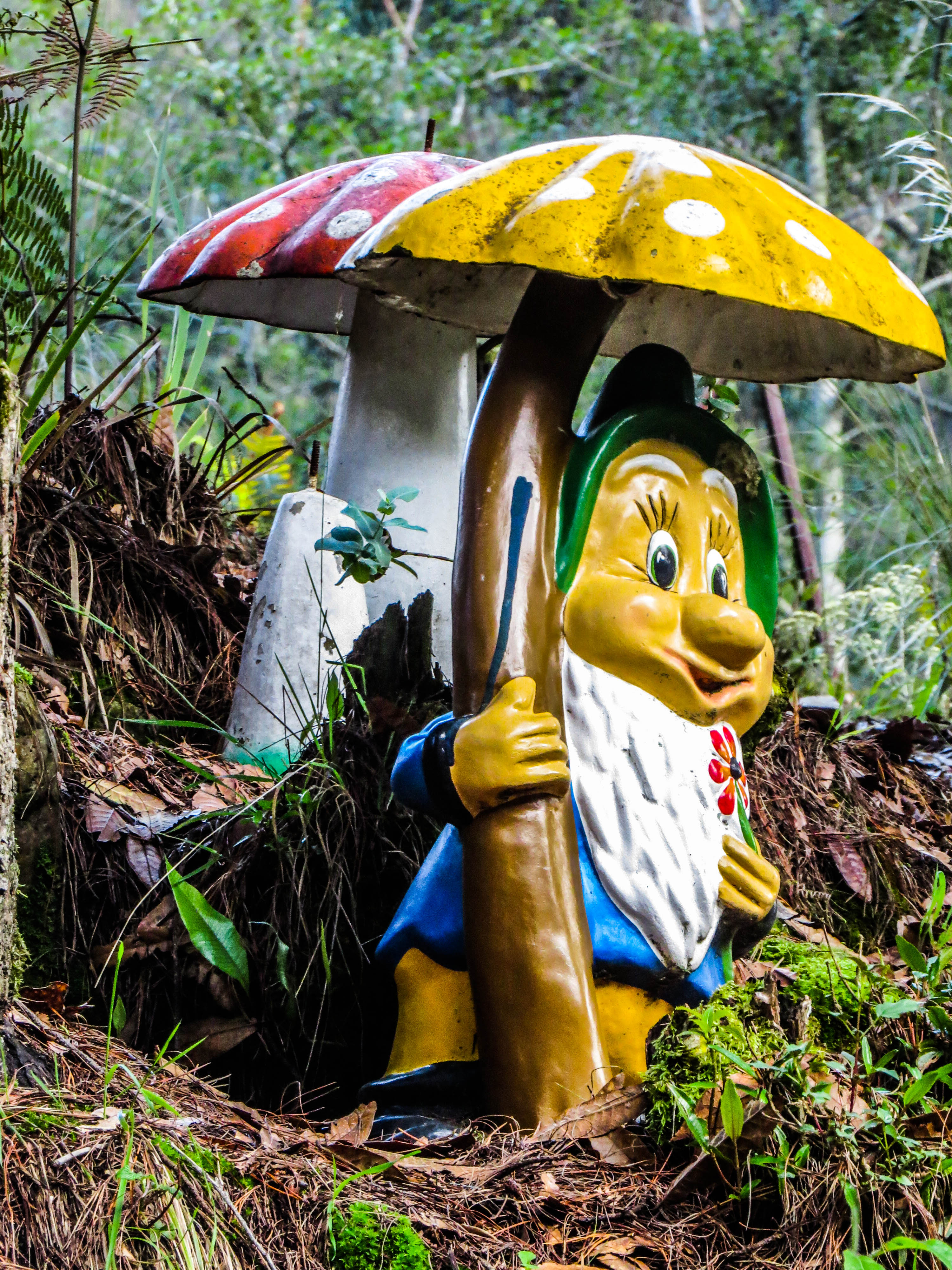 Representación a los mitos y leyendas del sector.